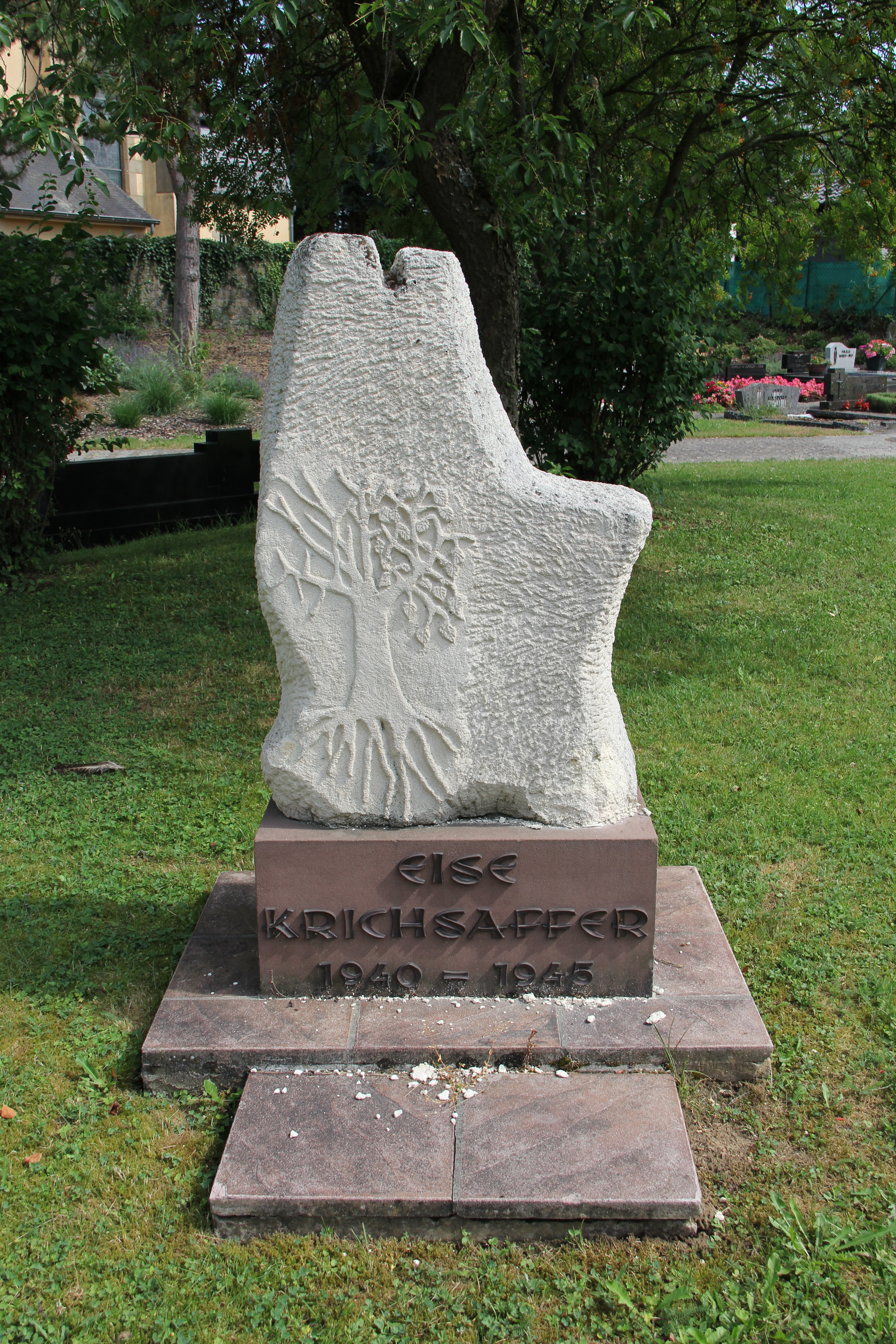 De Monument aux morts zu Näerden um Kierfecht. D'Monument huet d'Form vum Lëtzebuerger Land mat der Opschrëft: Eise Krichsaffer 1940-1945